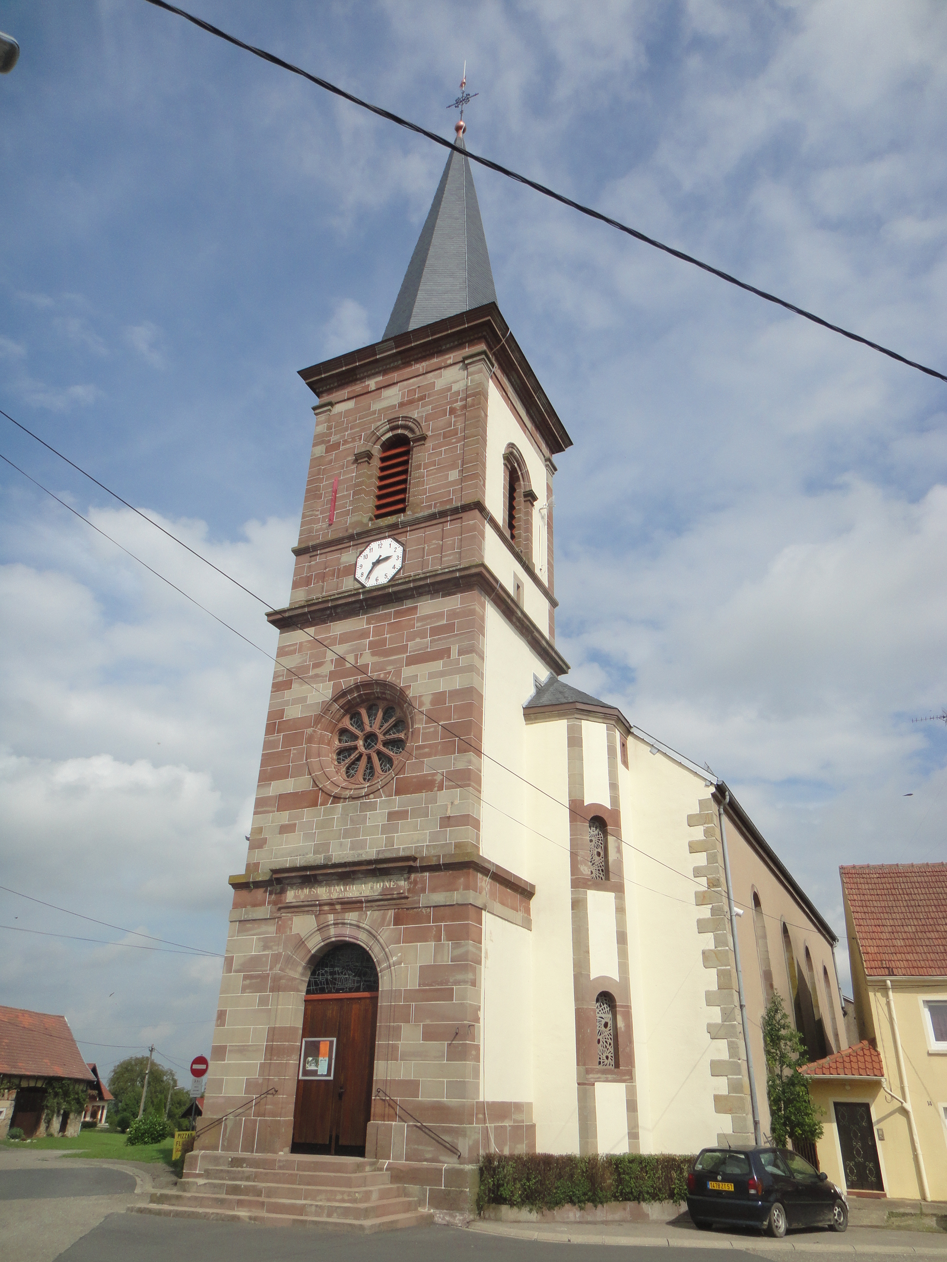 Eglise de Vittersbourg, Moselle (France)